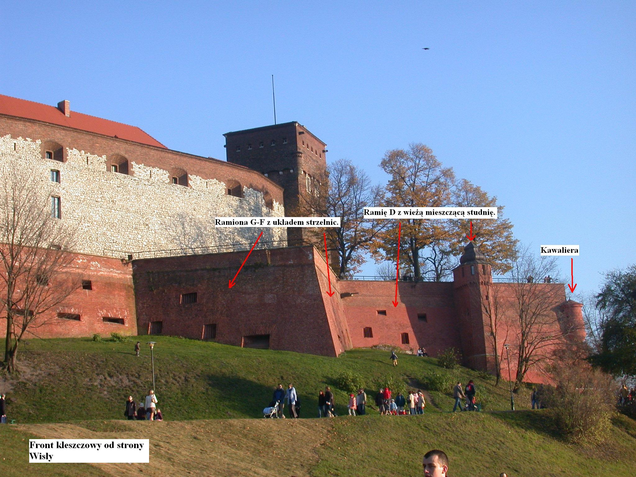 Festung Krakau - Twierdza Kraków - Wawel, fort kleszczowy